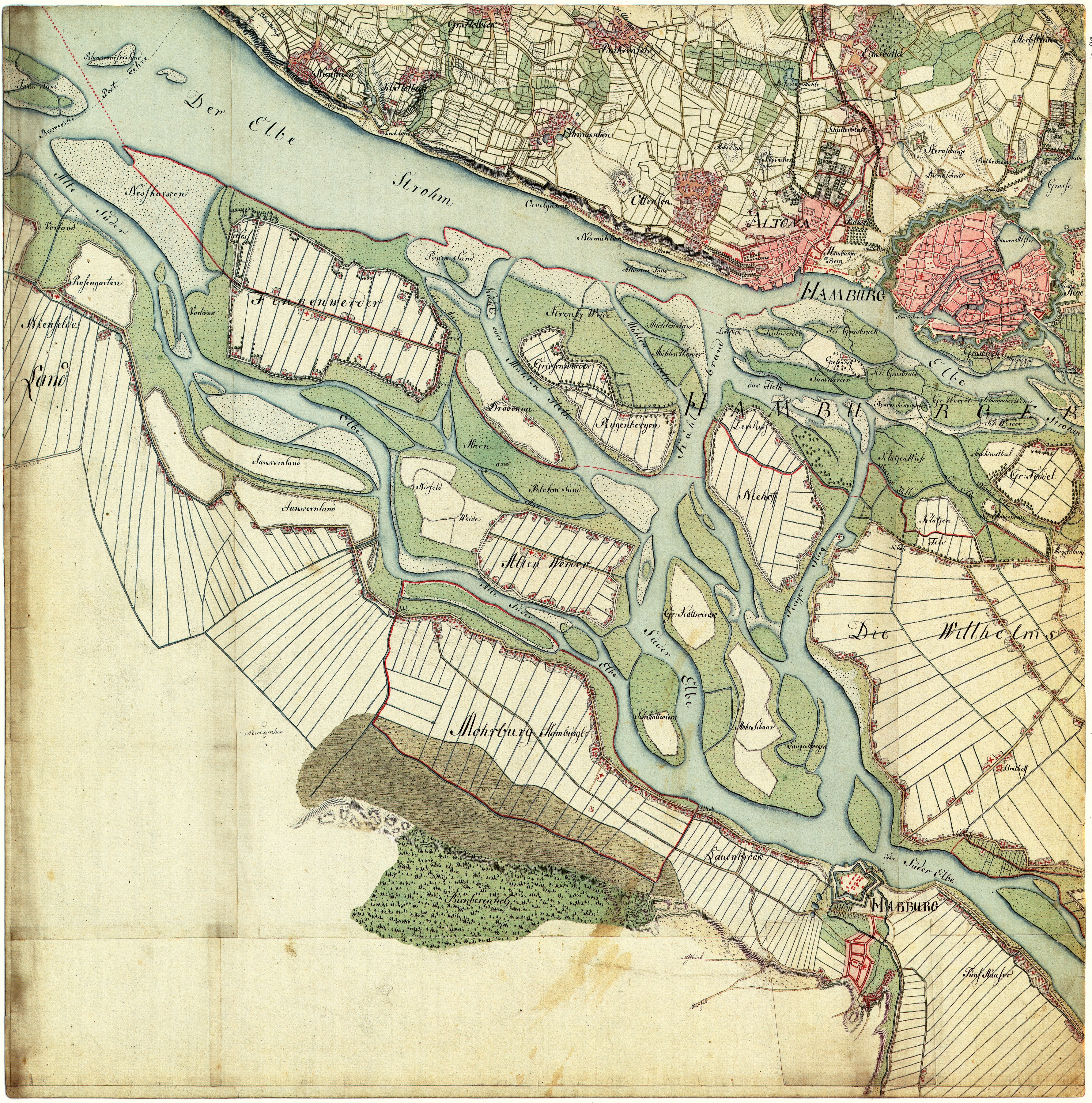 Altona, Hamburg, Harburg. Aufgenommen in den Jahren 1789 bis 1796 unter der Direktion des Majors Gustav Adolf von Varendorf durch Offiziere des Schleswigschen Infanterieregiments